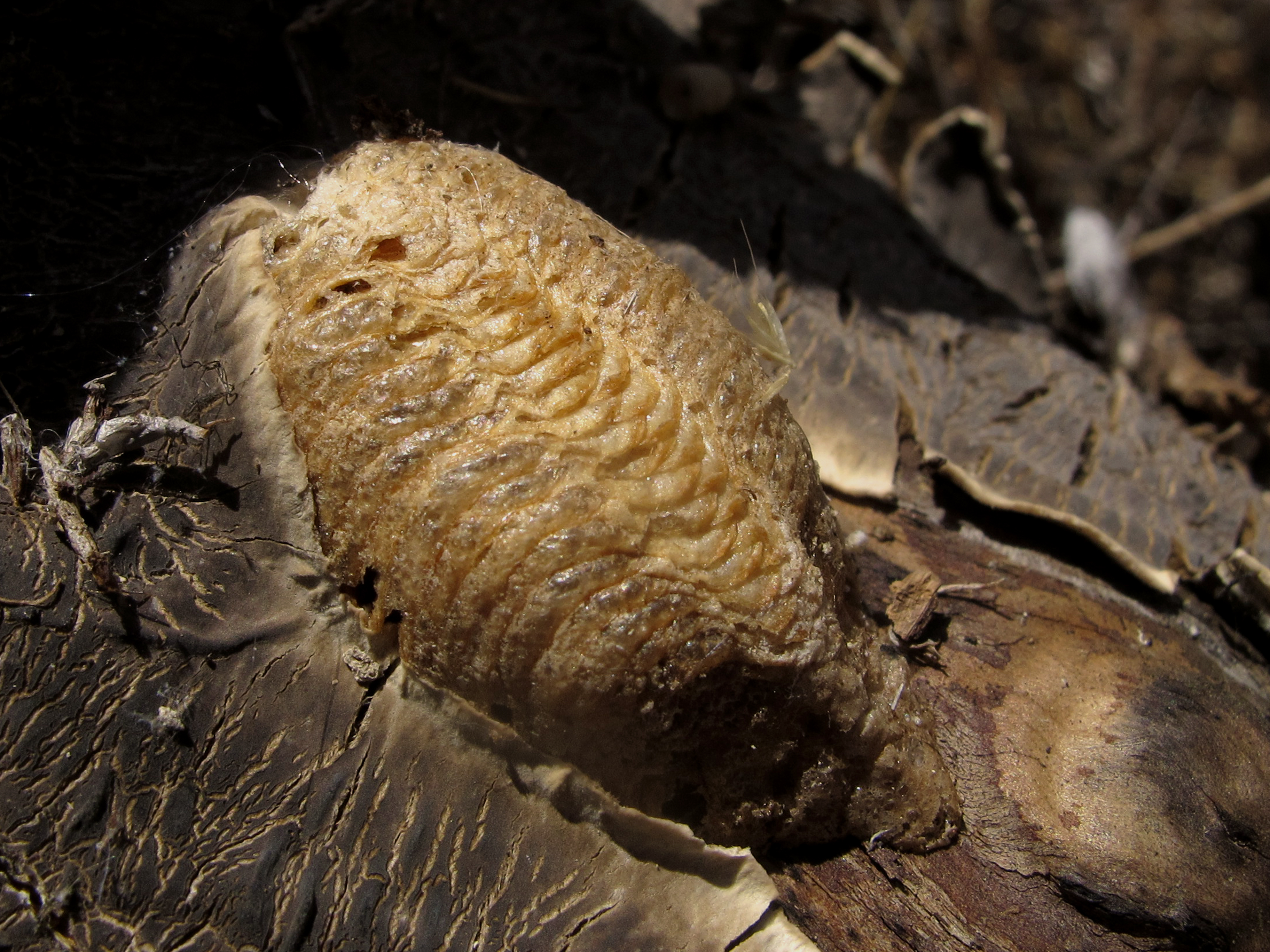 Una ooteca es el depósito de huevos rodeados por una proteína espumosa que se endurece en contacto con el aire formando una cubierta de protección. Las mantis forman una una especie de masa donde están los huevos pegados los unos a los otros, que es fijada a una piedra u otro objeto.